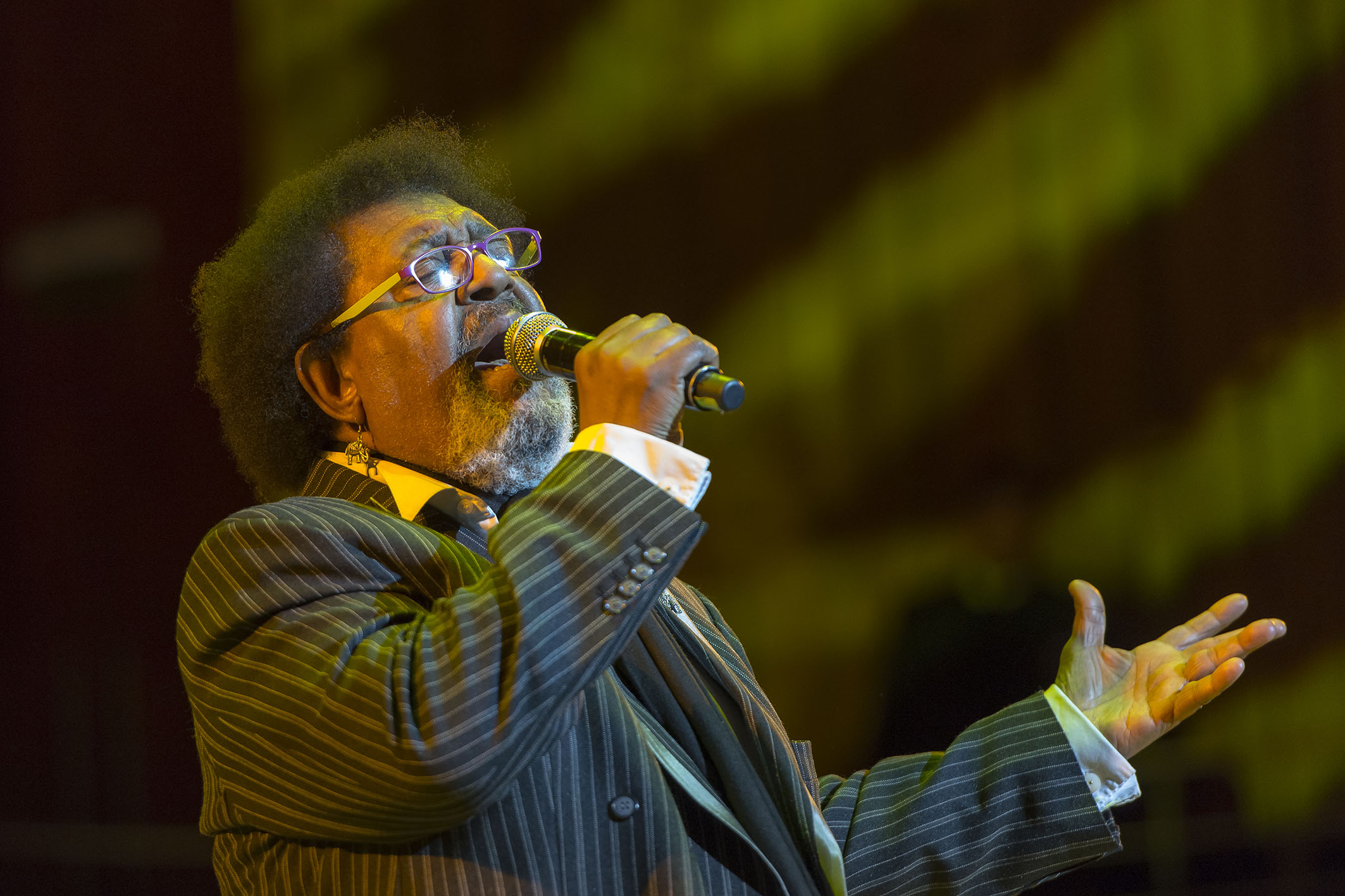 Buenos Aires, 23 de agosto de 2015: El cantante, compositor y músico uruguayo Rubén Rada presentó su disco “Tango, milonga y candombe”, en el auditorio "La Ballena Azul" del Centro Cultural Kirchner (CCK), como parte del ciclo "Música del Sur". Foto: Manuel Pose Varela / CCK